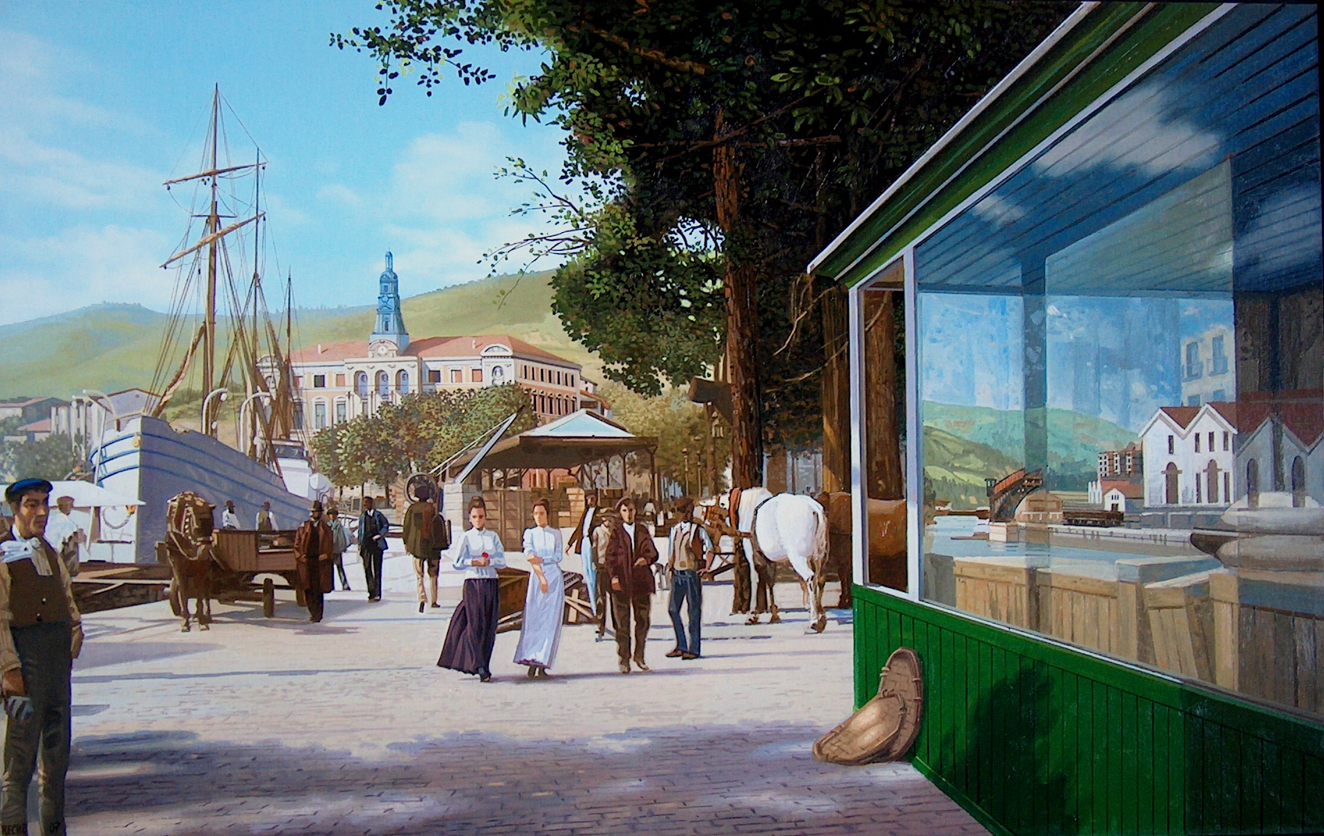 Carga de mercancías en el muelle con el Ayuntamiento al fondo